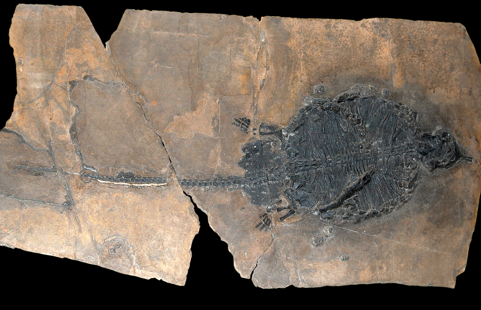 Museo civico di storia naturale Milano